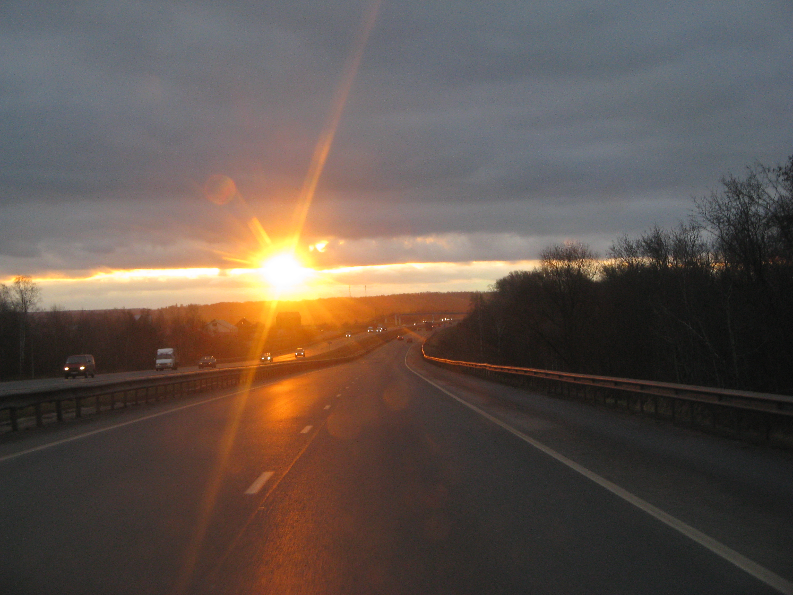 Трасса М5 (Новорязанское шоссе) в районе деревни Чулково. Московская область. Россия.